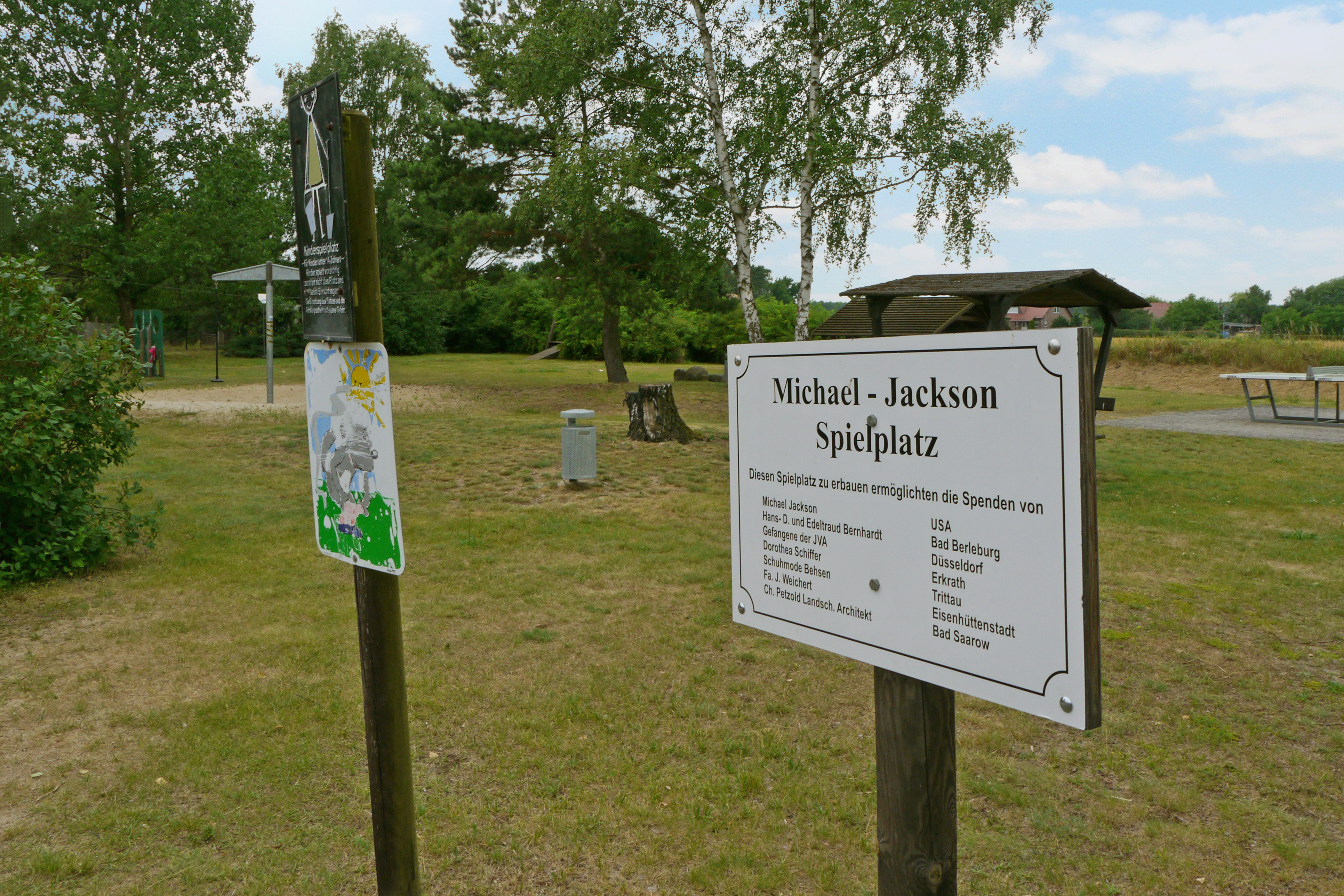 Schild zum Michael-Jackson-Spielplatz in Ratzdorf. Der Spielplatz selbst ist hier nur teilweise zu sehen. Michael Jackson spendete nach dem Oderhochwasser 1997 32.000 DM